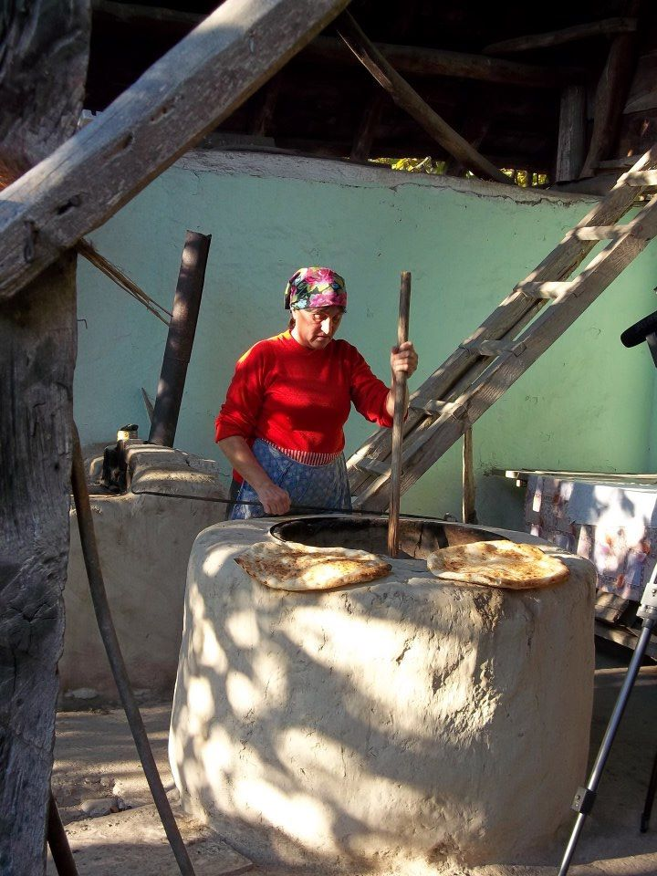 Wypiek chleba przez Udinów. Udi people